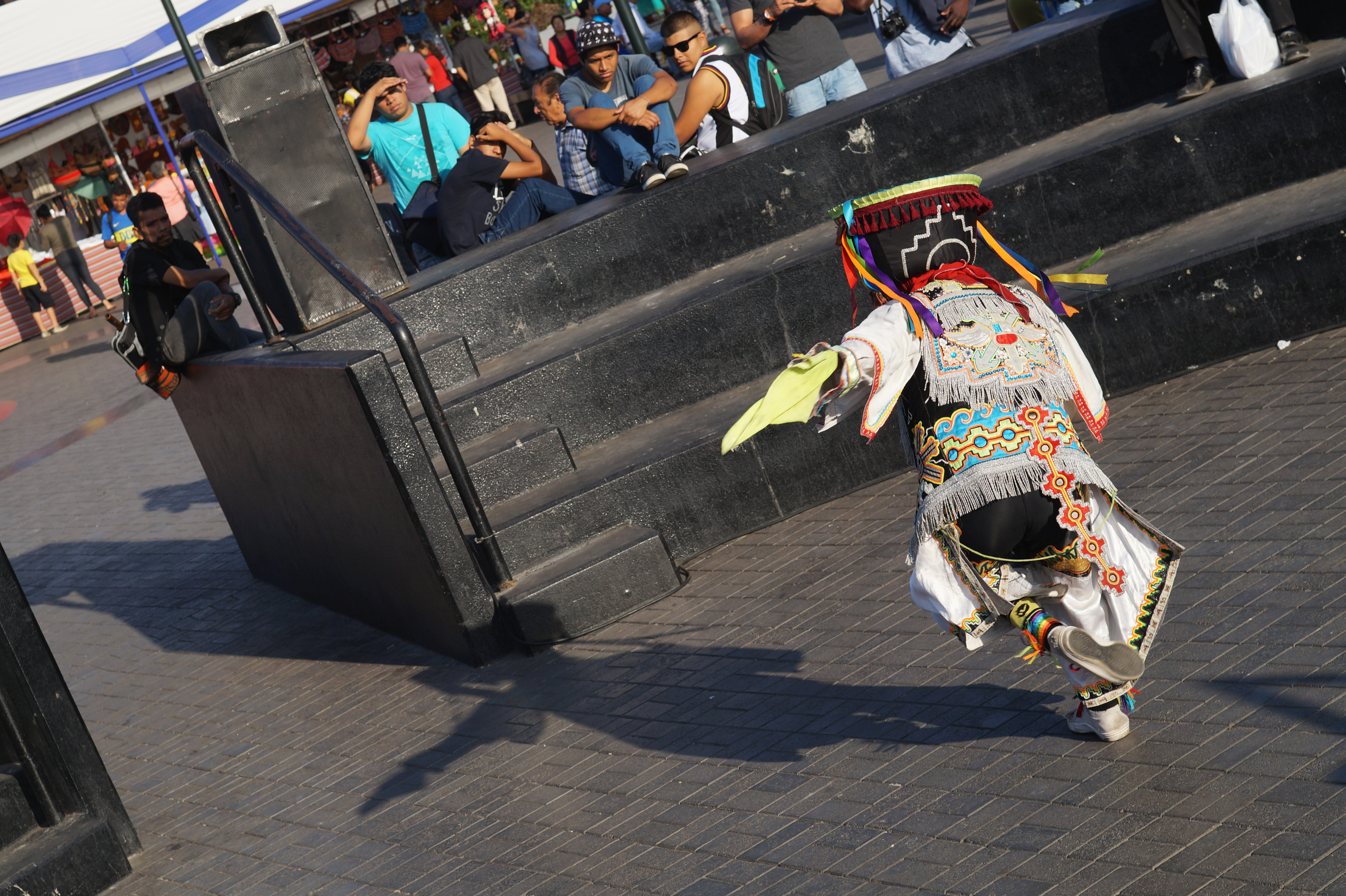 Plano Holandés del Danzaq Twitter: DiNoBokeh Instagram: artdino_ Sitio web: Perú Generación XXI Facebook: ArtDiNo15